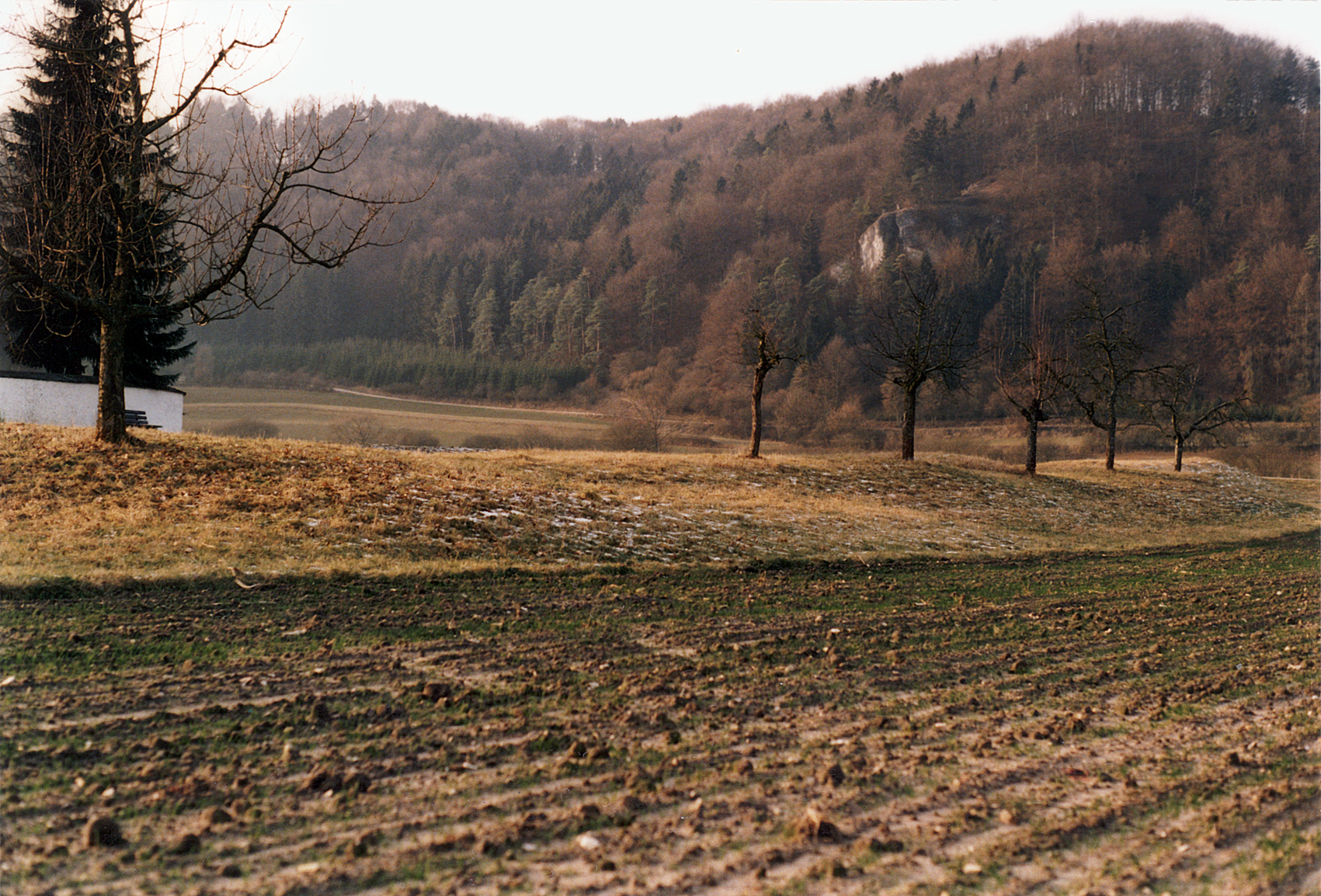 Limeskastell Böhming im Altmühltal, Nordostwall mit Blick auf den Höhenzug, der die Limesmauer trägt.